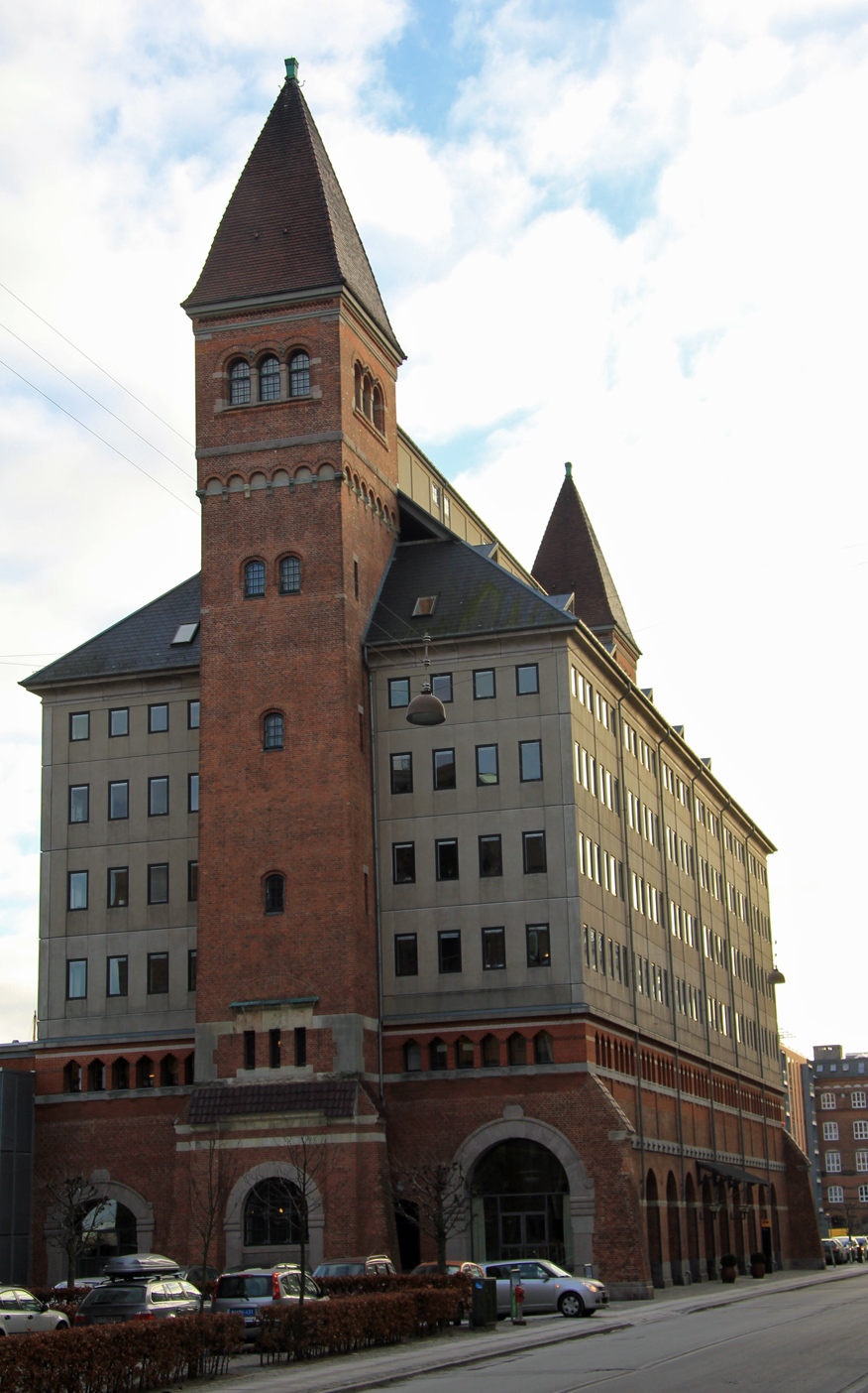 Hovedkvarter for Danske Regioner